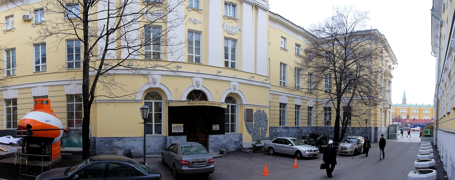 Государственный геологический музей им. В.И. Вернадского Российская академия наук